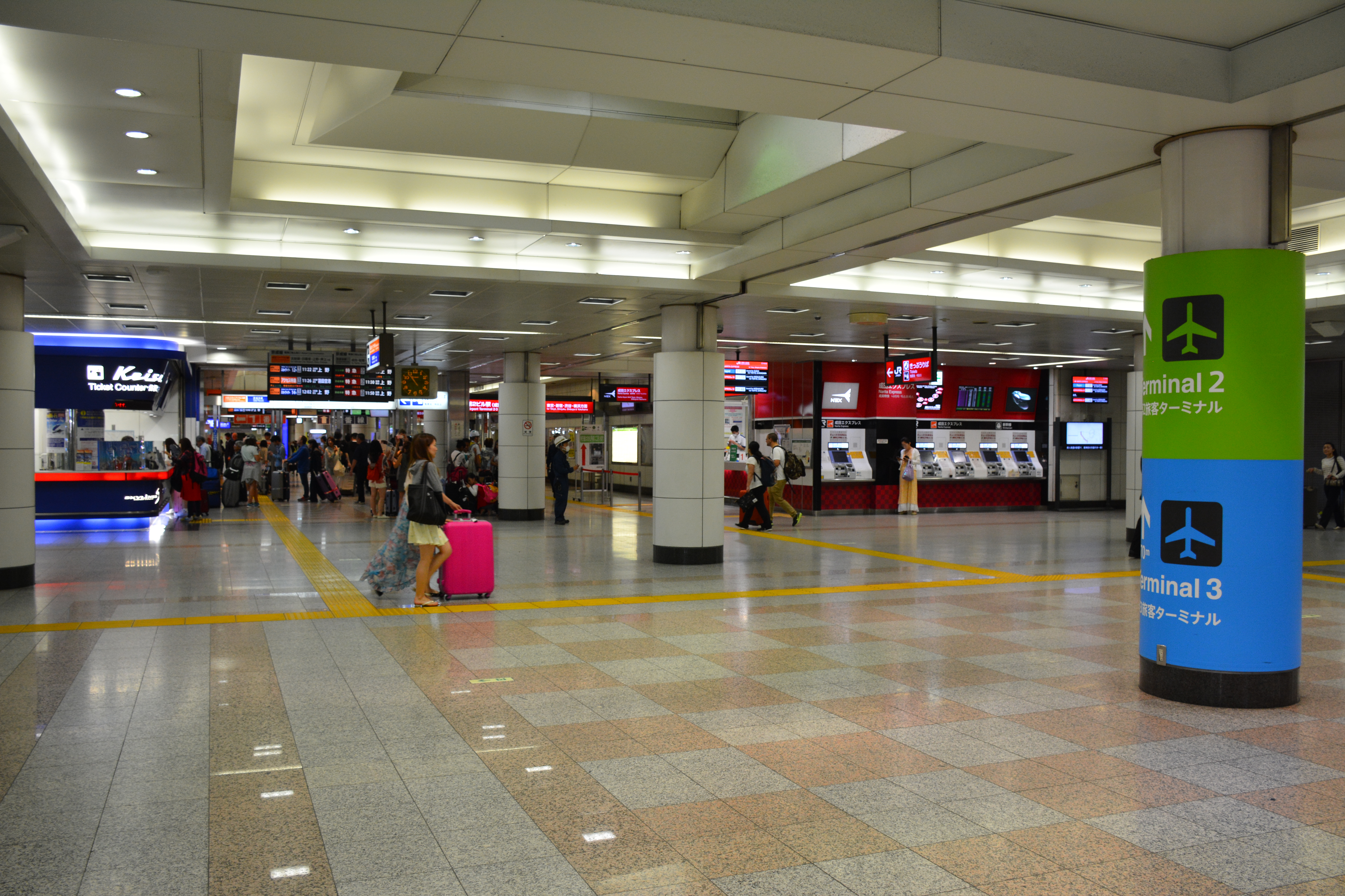 空港第2ビル駅